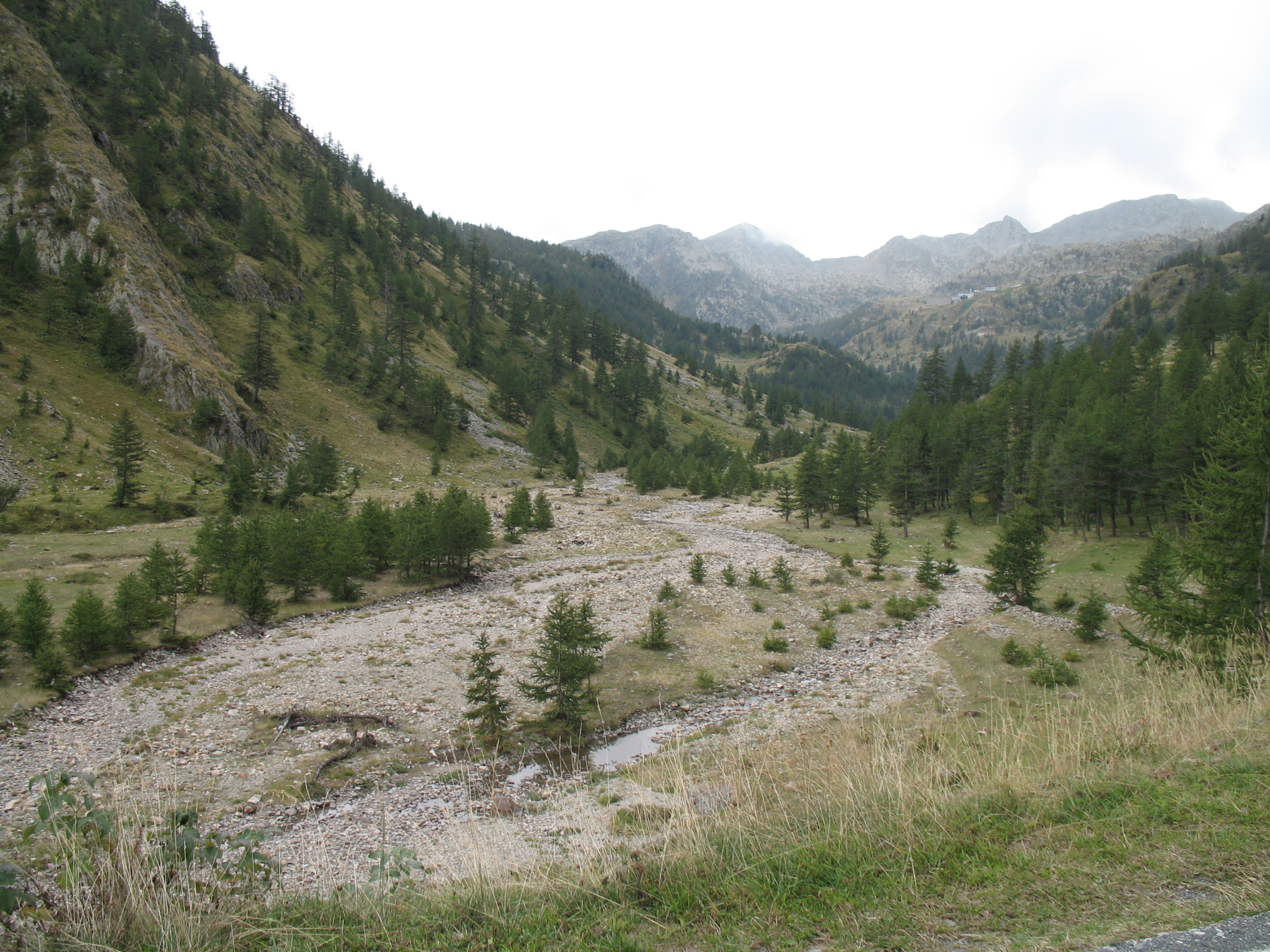 Immagine da Vinadio, valle Stura di Demonte, in provincia di Cuneo, Piemonte, Italia